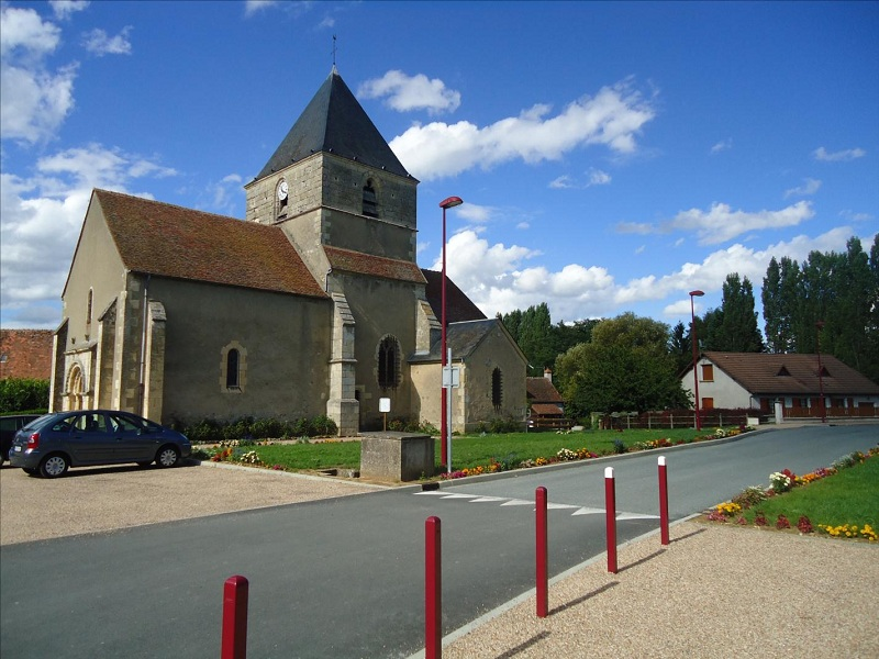 Le sentier du passeur, à Gimouille